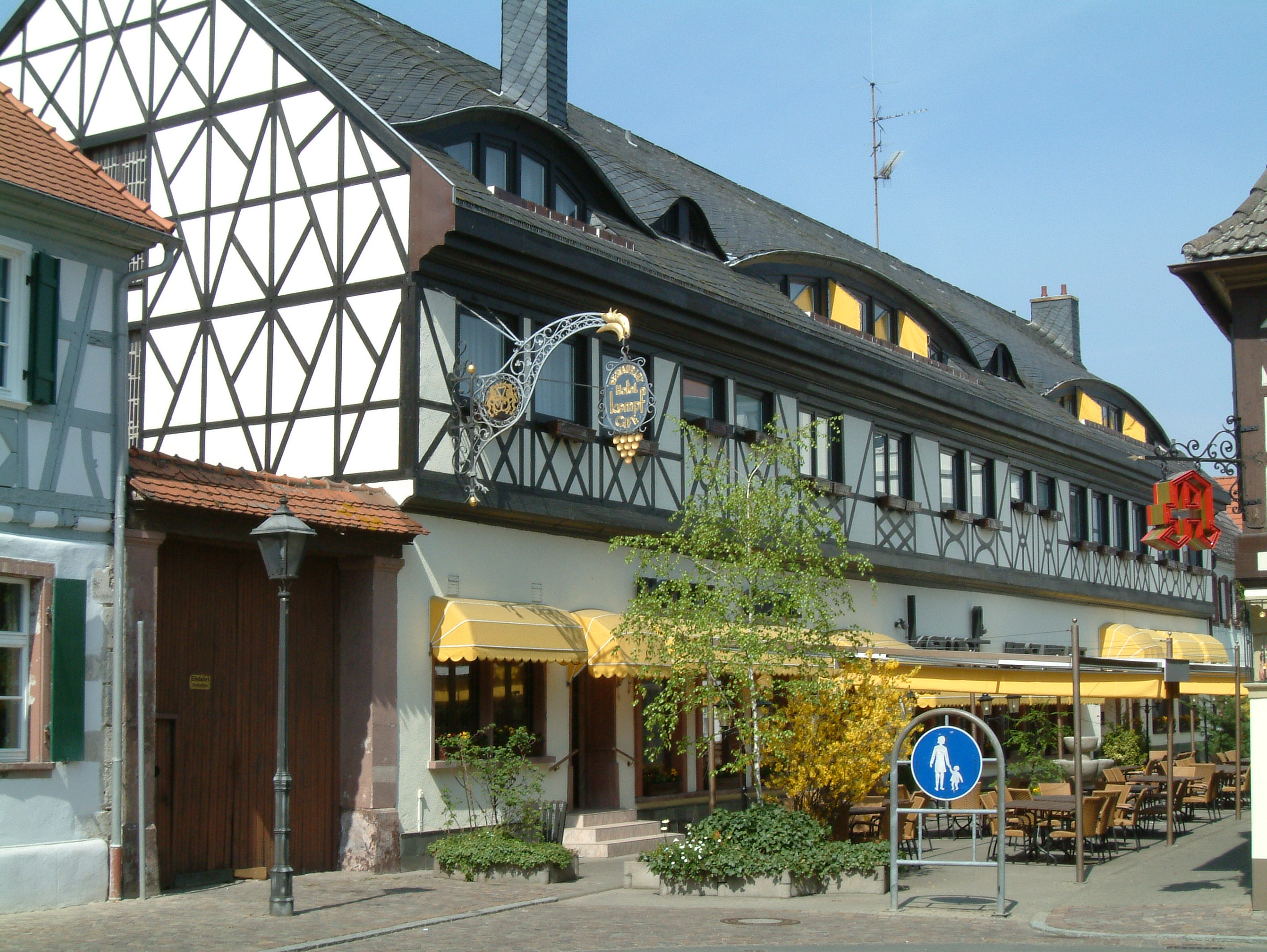 Café Kempf zu Dirmstein, selbst fotografiert am 2006-04-24 und freigegeben durch Benutzer:Mundartpoet